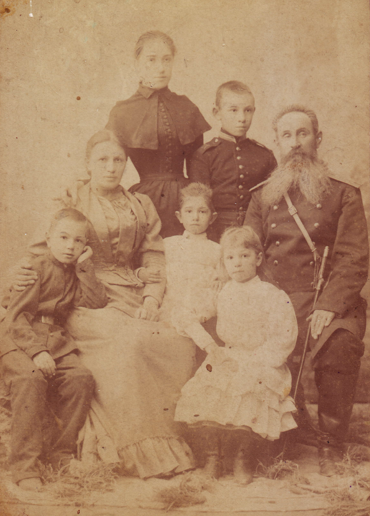 Эммануил Тизенгаузен c родителями, братьями и сестрами, 1893 год